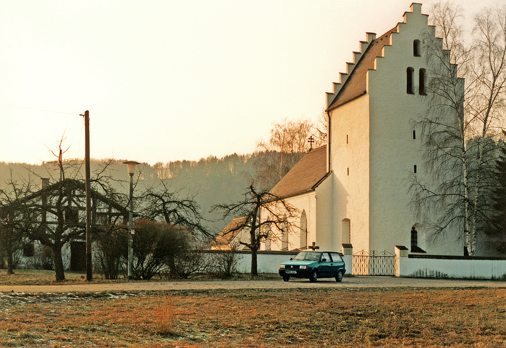 Die Kirche von Böhming in Bayern steht auf Teilen der Principia des ehemaligen Kastells. Zustand im Januar 1993.